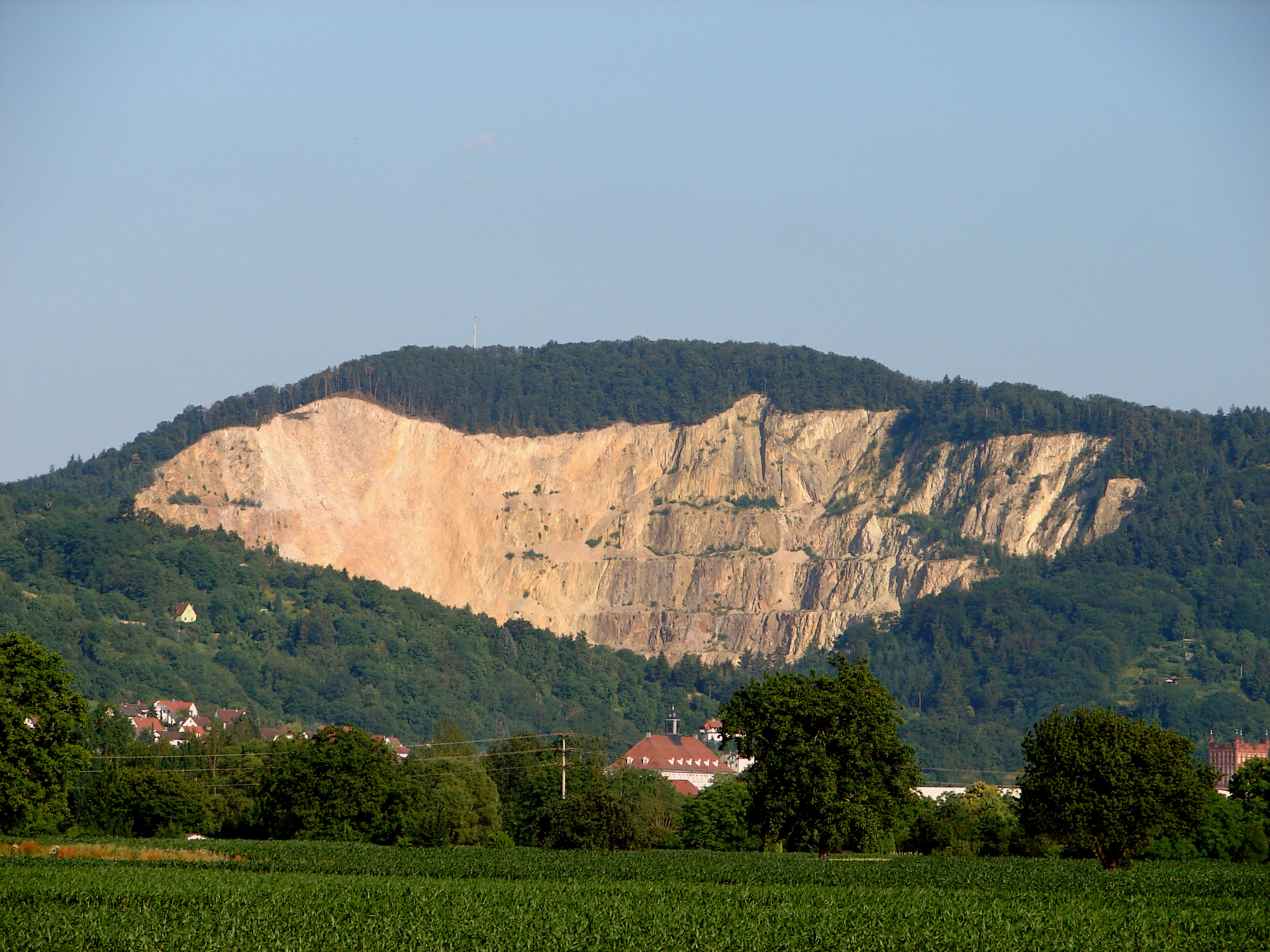 Blick von Sulzbach auf den Weinheimer Steinbruch, Baden-Württemberg.